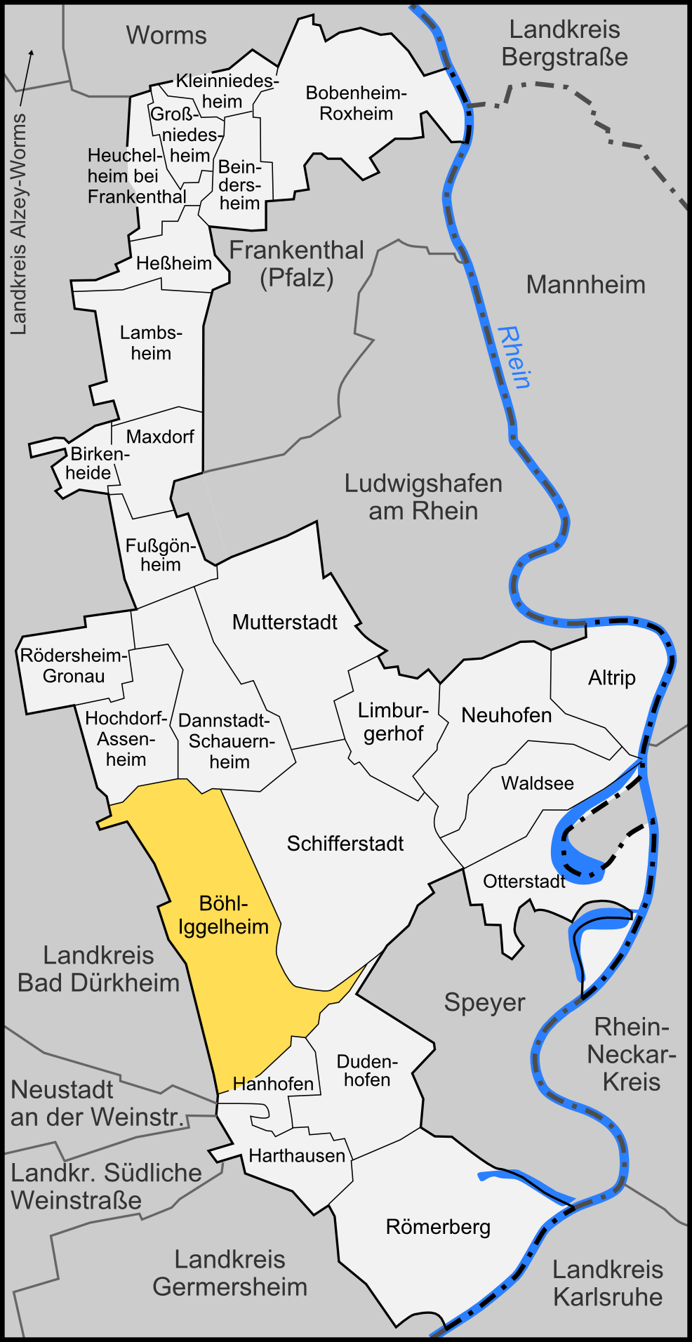 Karte der Gemeinde Böhl-Iggelheim im Rhein-Pfalz-Kreis